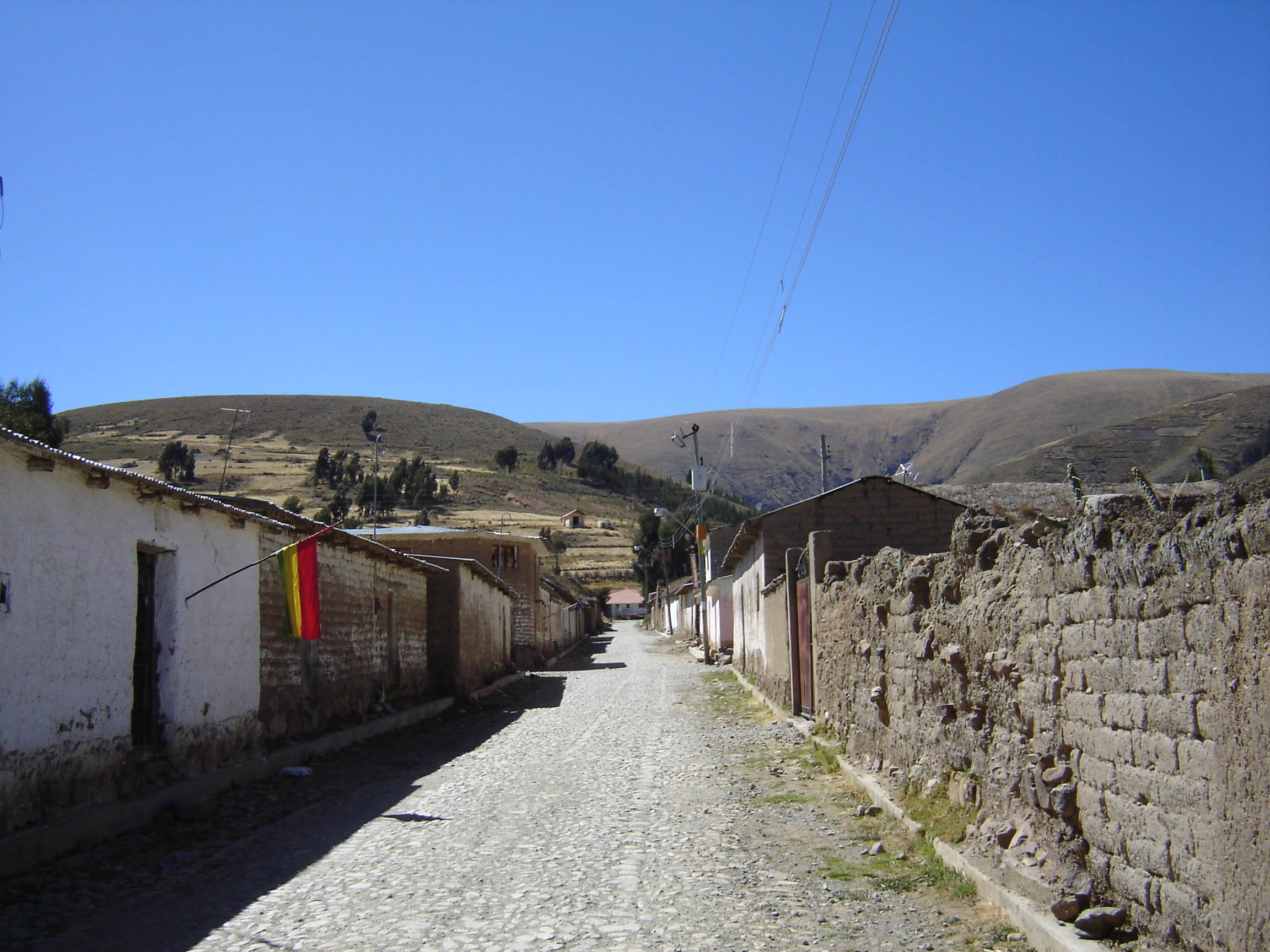 Vista desde el sur de la calle Aroma, con parte del Hospital al final de la calle y con la capilla del calvario de Santa Bárbara en el cerro. Runa Simi: Jaruma k'ikllu qhawariy qullamantapacha, k'ikllu tukukuypitaq kashan Jampiwasi, urqupatapitaq Santa Bárbaraq kalwariunpa kapillan.